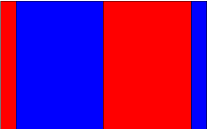 Soner i kanonball